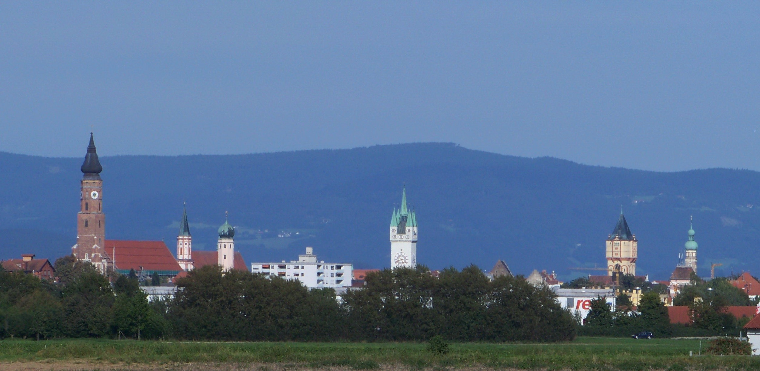 Straubinger Türme. Von links nach rechts: St. Jakob, Karmelitenkirche, Jesuitenkirche, Stadtturm, Wasserturm, Kirchturm St. Veit. Im Hintergrund sind die Berge des Bayerischen Waldes zu sehen.